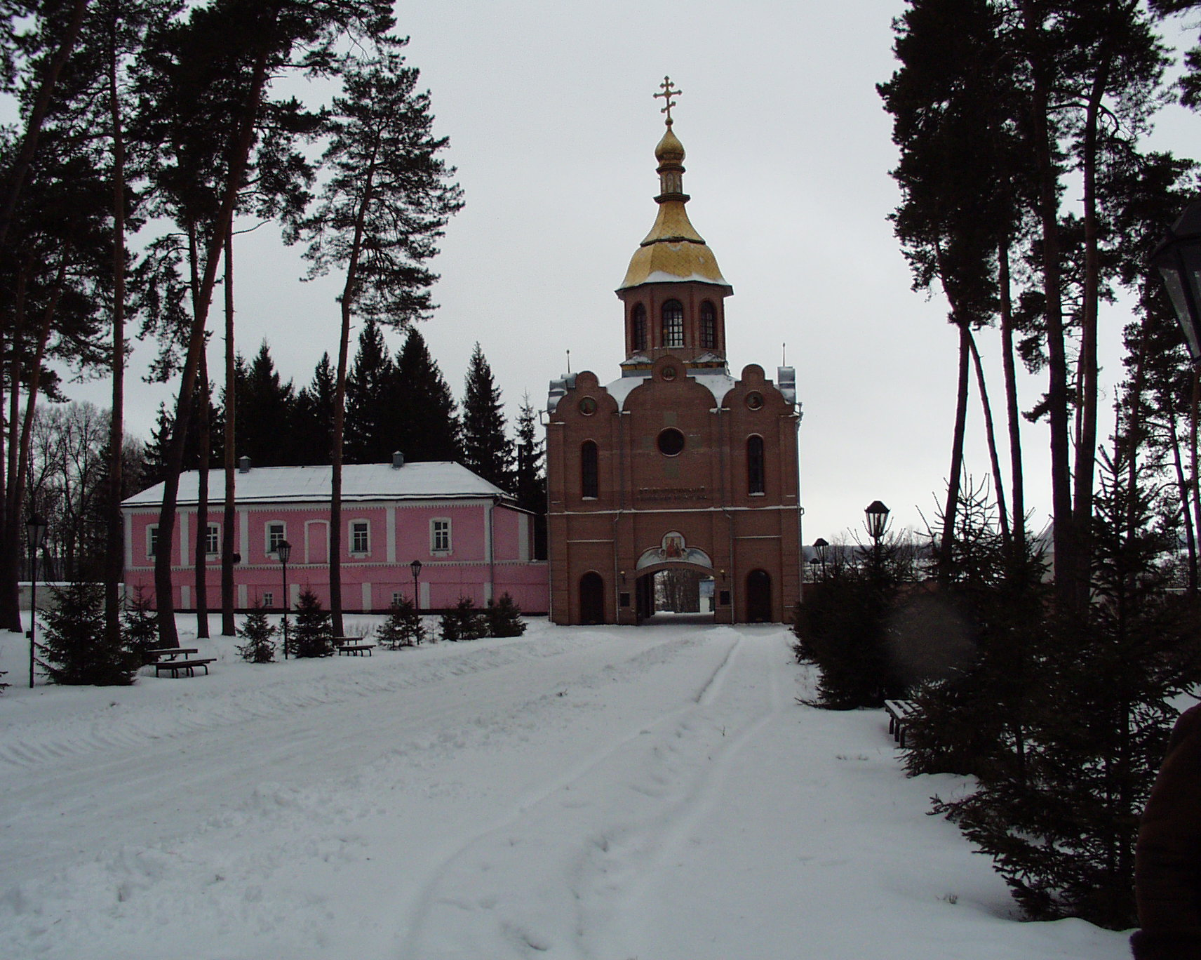 Вхід до Глинської пустині - надвратна церква